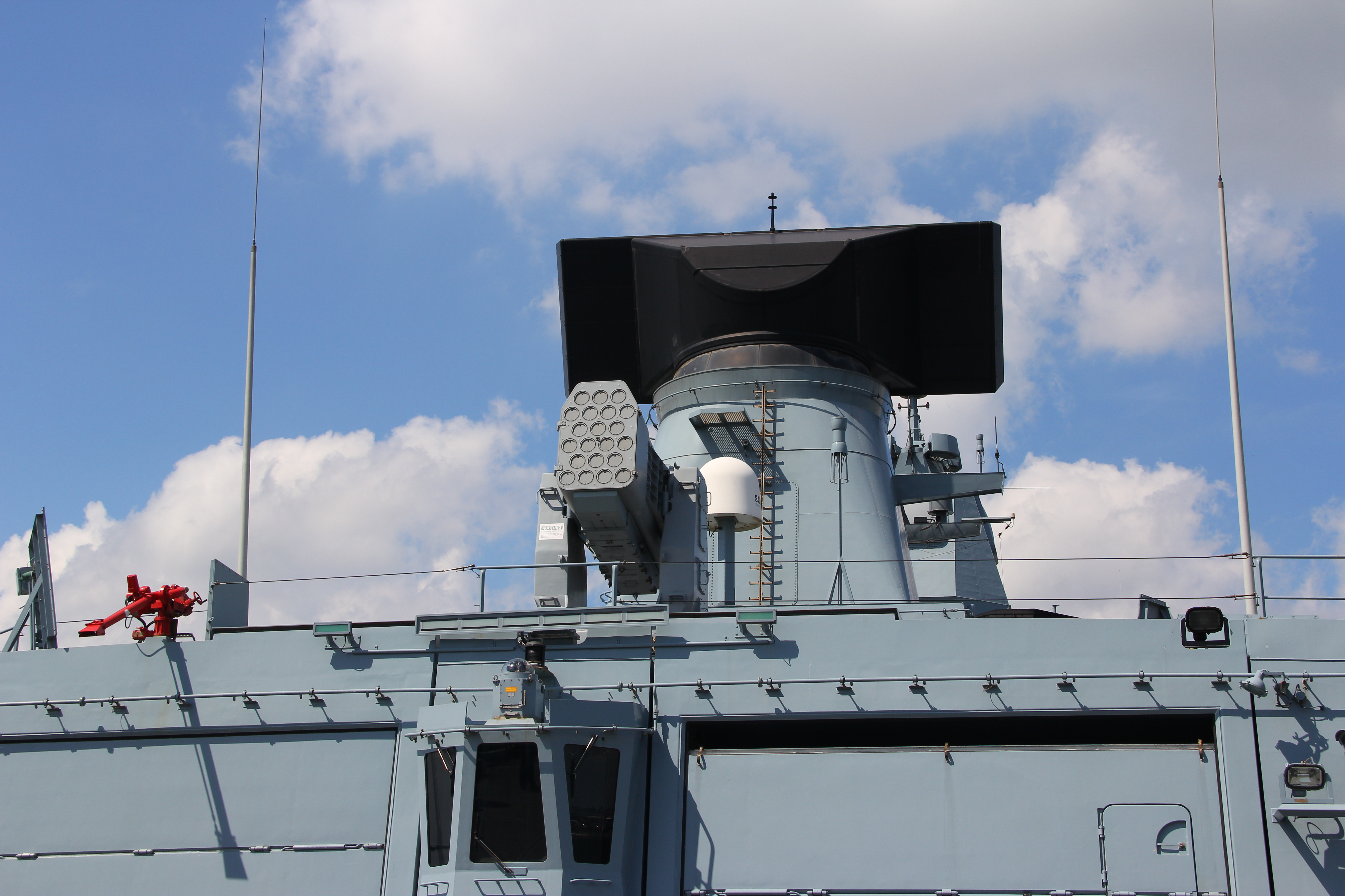 Fregatte Hamburg, F220